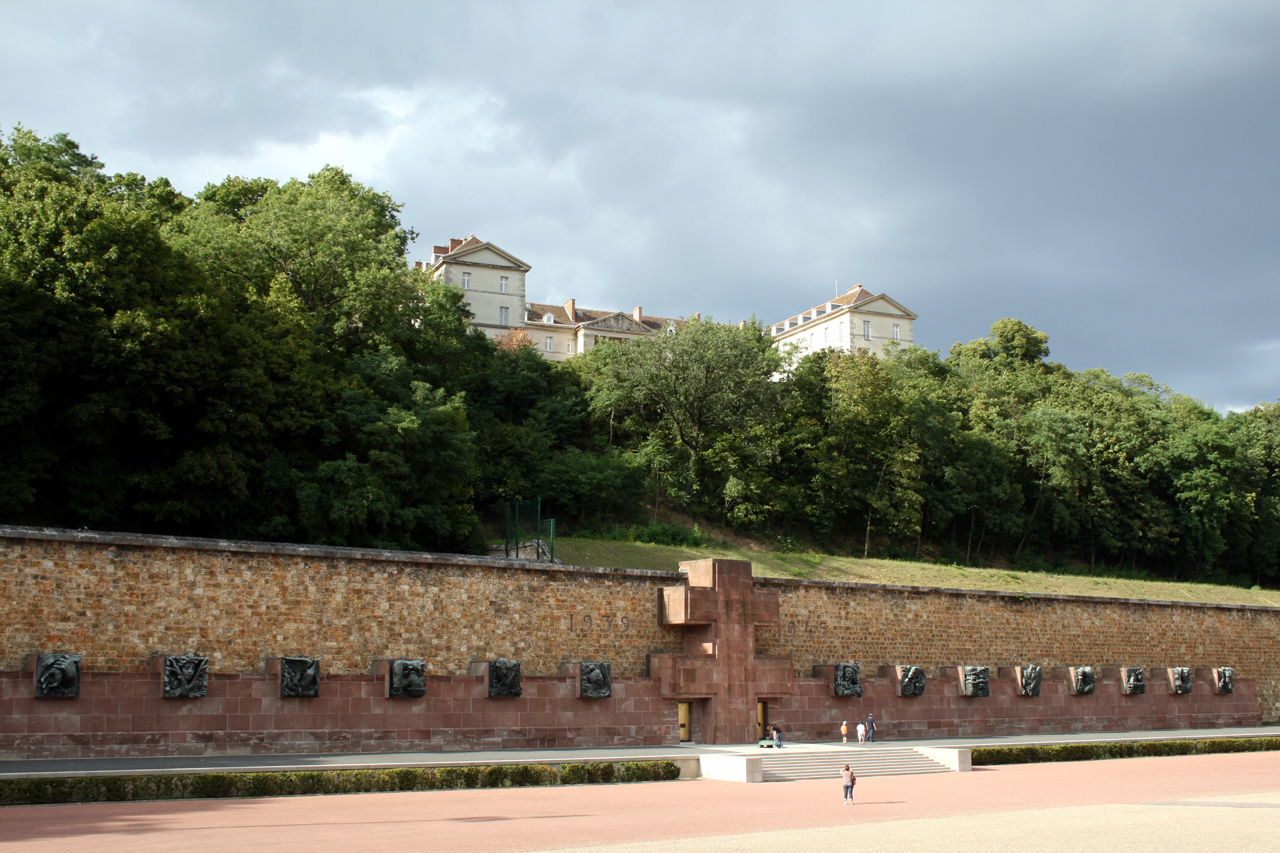 Le mémorial et le fort du Mont Valérien